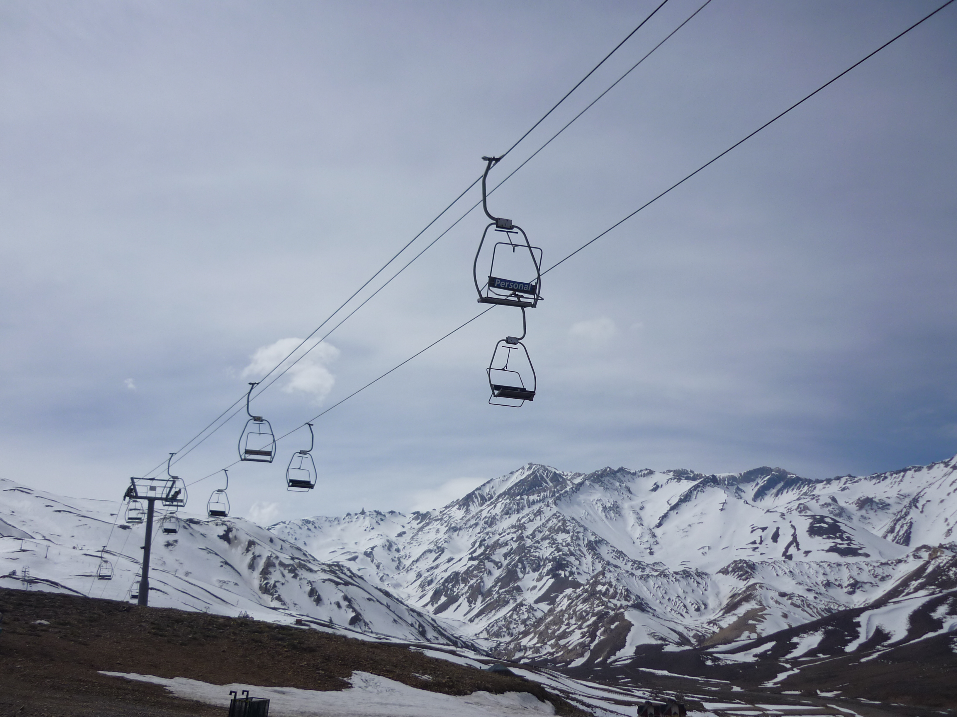 Sessellift in Las Leñas, Argentinien